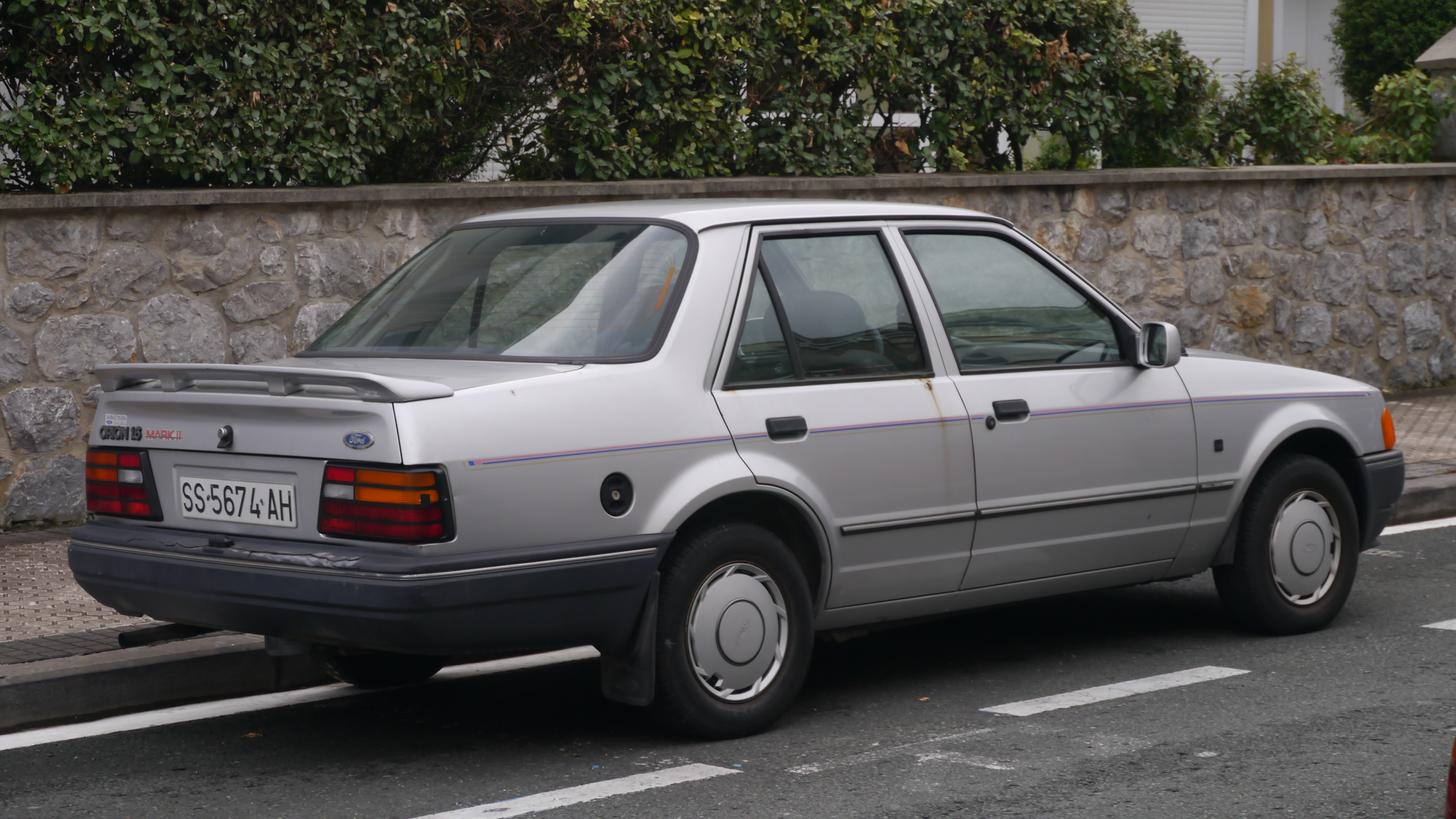 San Sebastian, Spain.